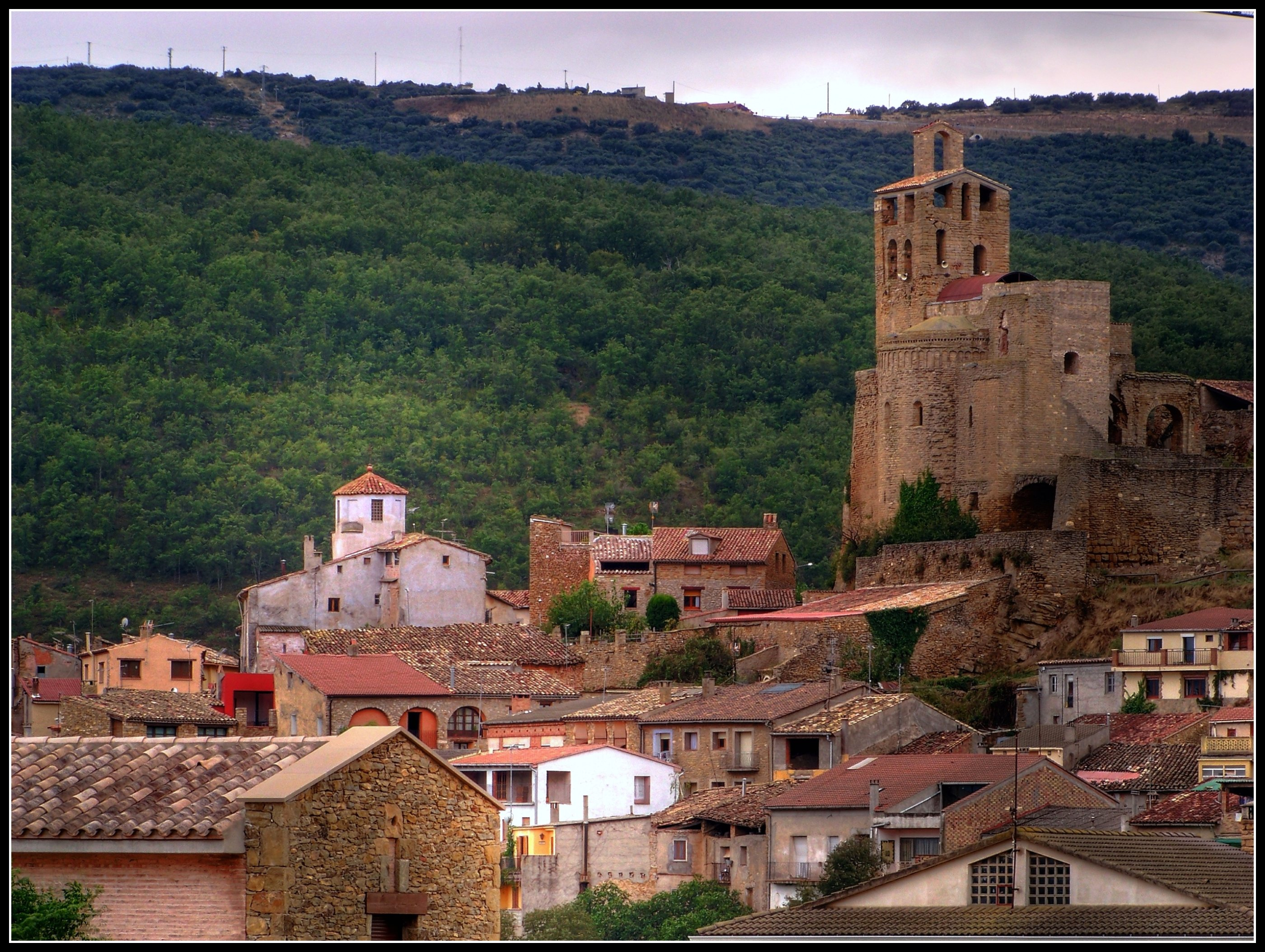 Castell i Col·legiata de Sant Pere (Àger)